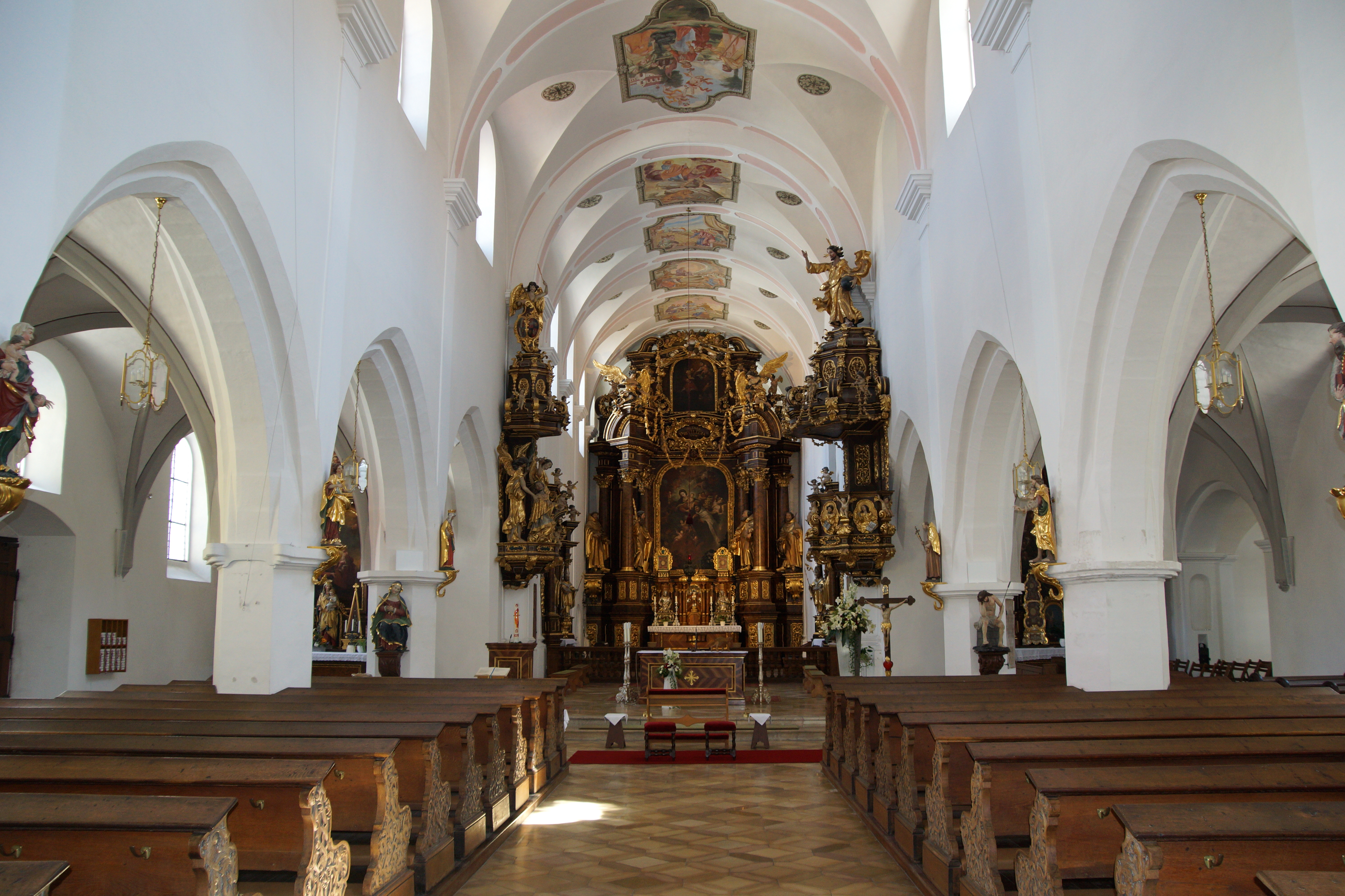 Die Klosterkirche des ehemaligen Karmelitenklosters in Abensberg